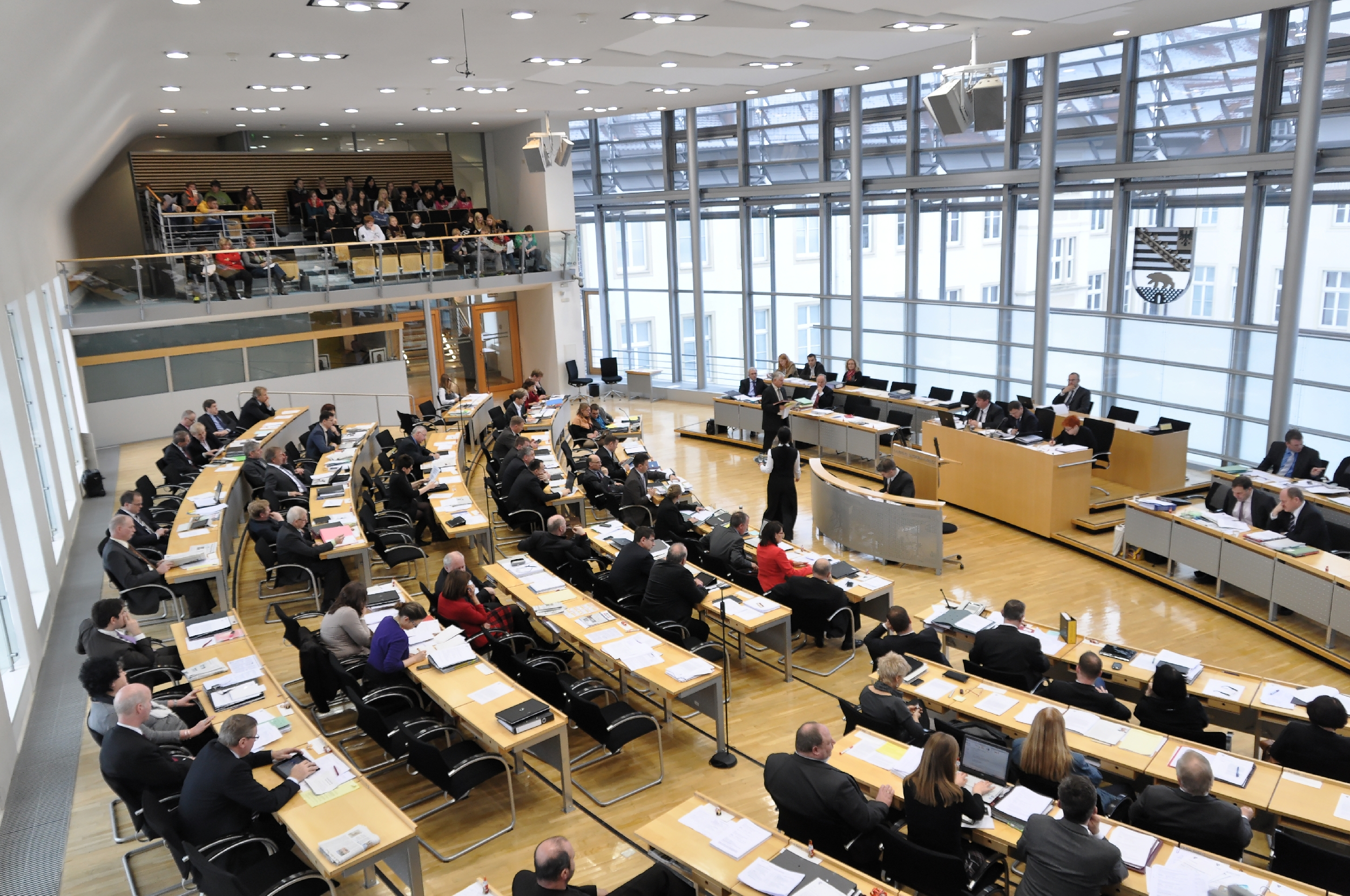 Fotos vom Landtagsprojekt Sachsen-Anhalt 2012